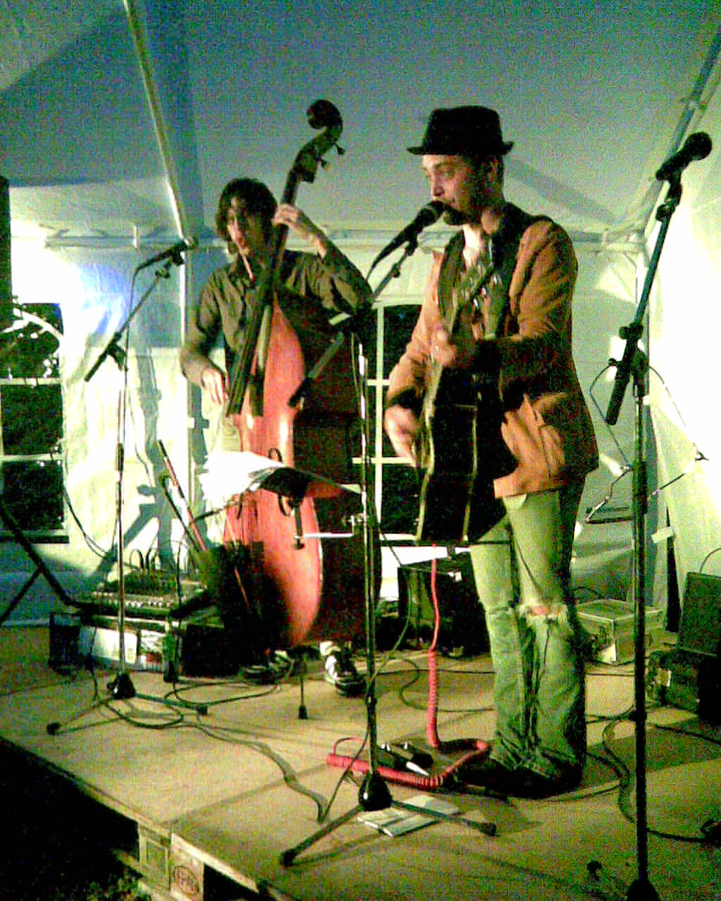 Dan Viktor live på Annas Café i Horn, 12/7 2008.